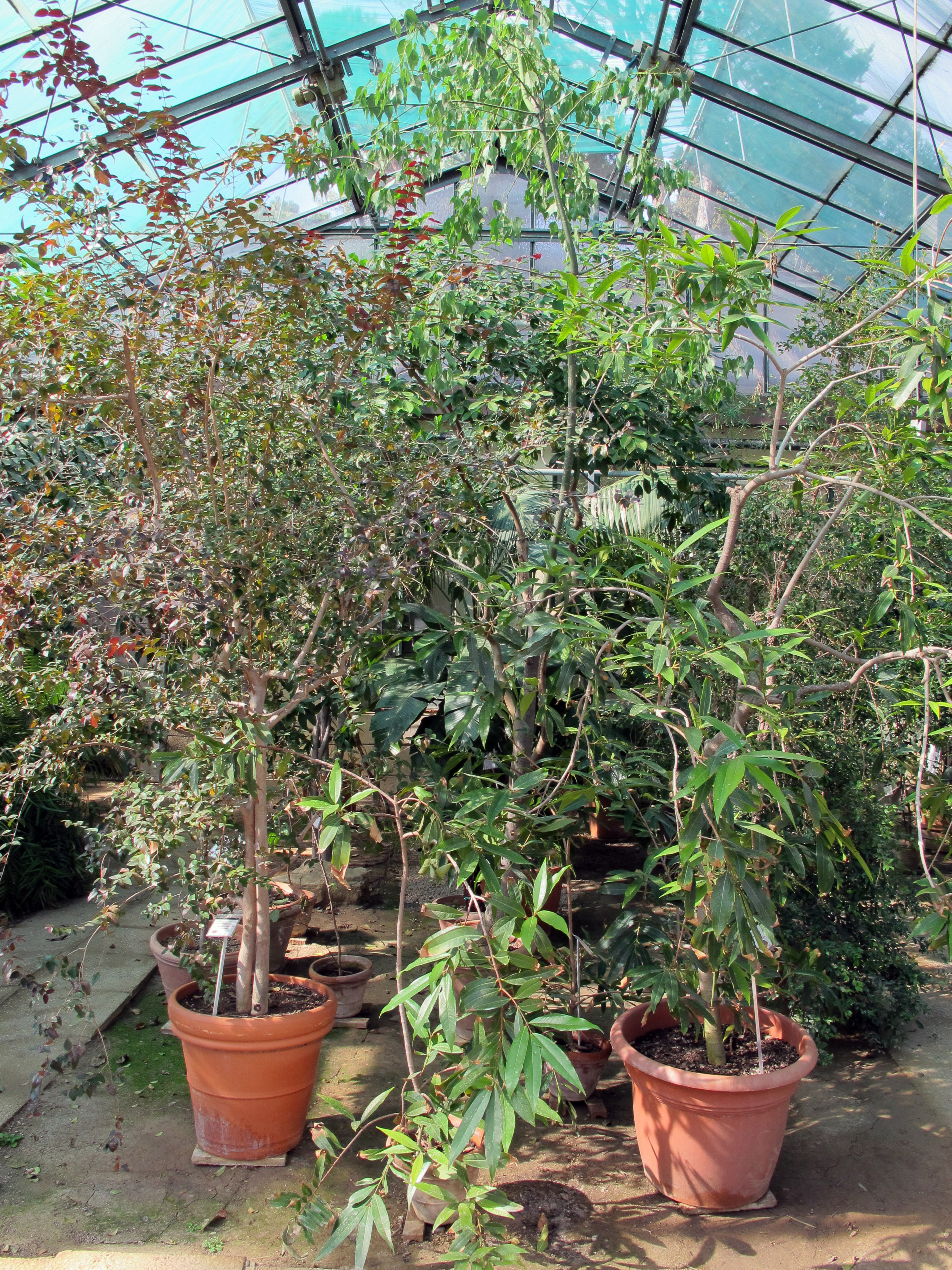 Istituto agronomico per l'oltremare, serre